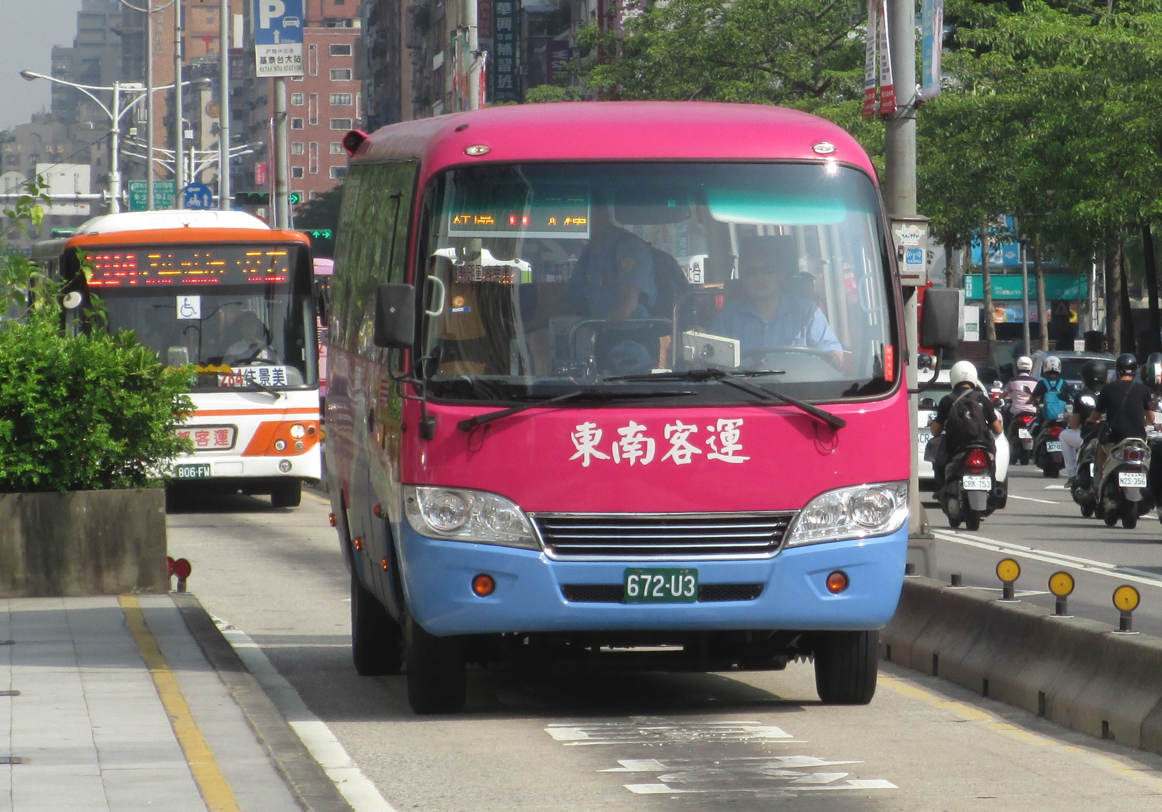 東南客運海格KLQ6759中型客車672-U3。